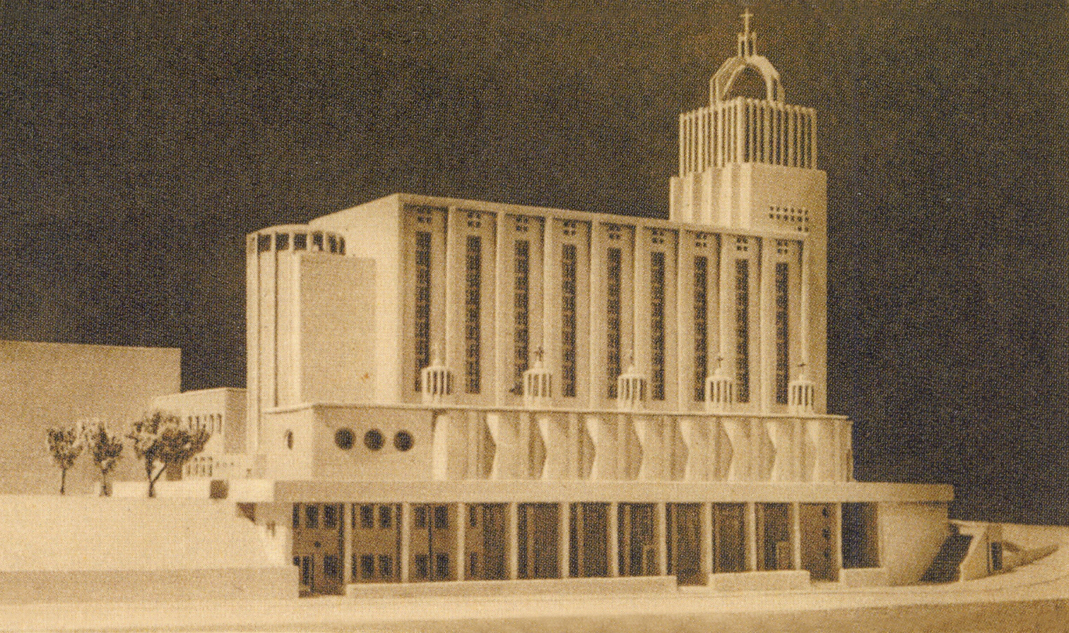 Макет костелу святого Вінцента де Поля отців місіонерів на вулиці Стуса у Львові.